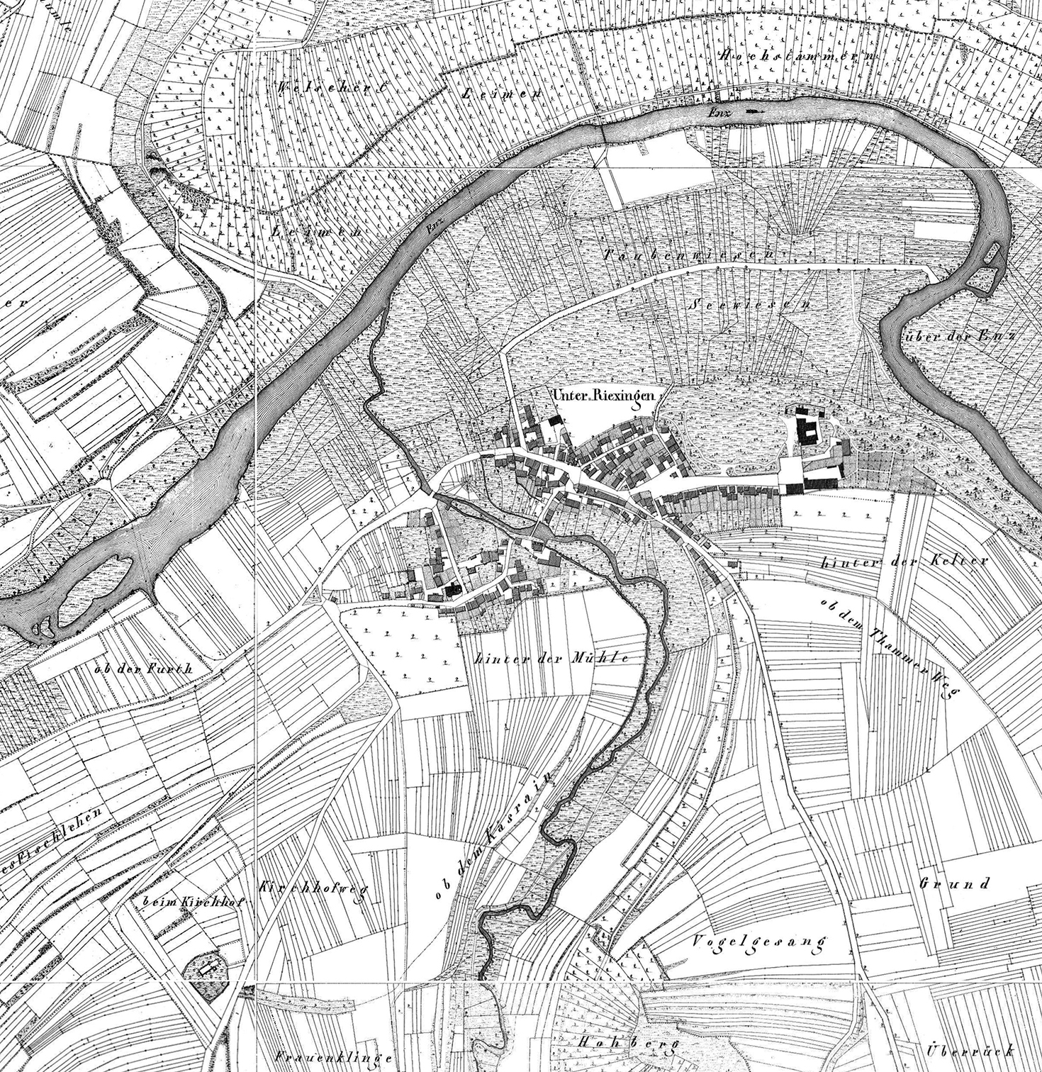 Unterriexingen 1832 mit Schloss, Frauenkirche, Bachmühle, Furt und Enzsteg am Fußweg nach Großsachsenheim. Composit aus den Blättern NO_40/1, 41/1, 42/1 sowie NW_40/1, 41/1 und 42/1 der württ. Urflurkarte (1832) im Maßstab 1:2500 Unterriexingen und Umgebung auf Blättern der württ. Urflurkarte von 1832